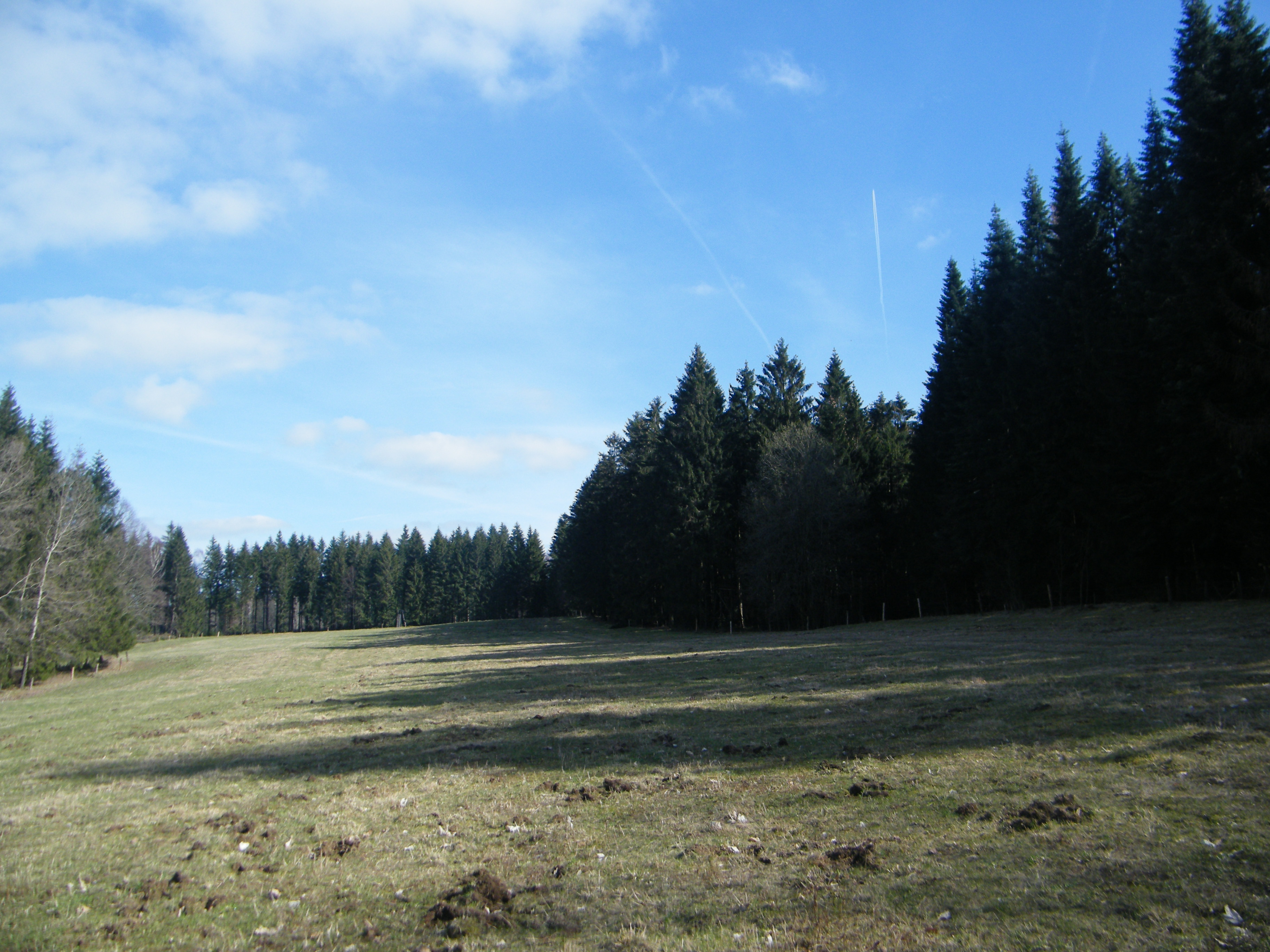 Hůrka ve Šluknovské pahorkatině